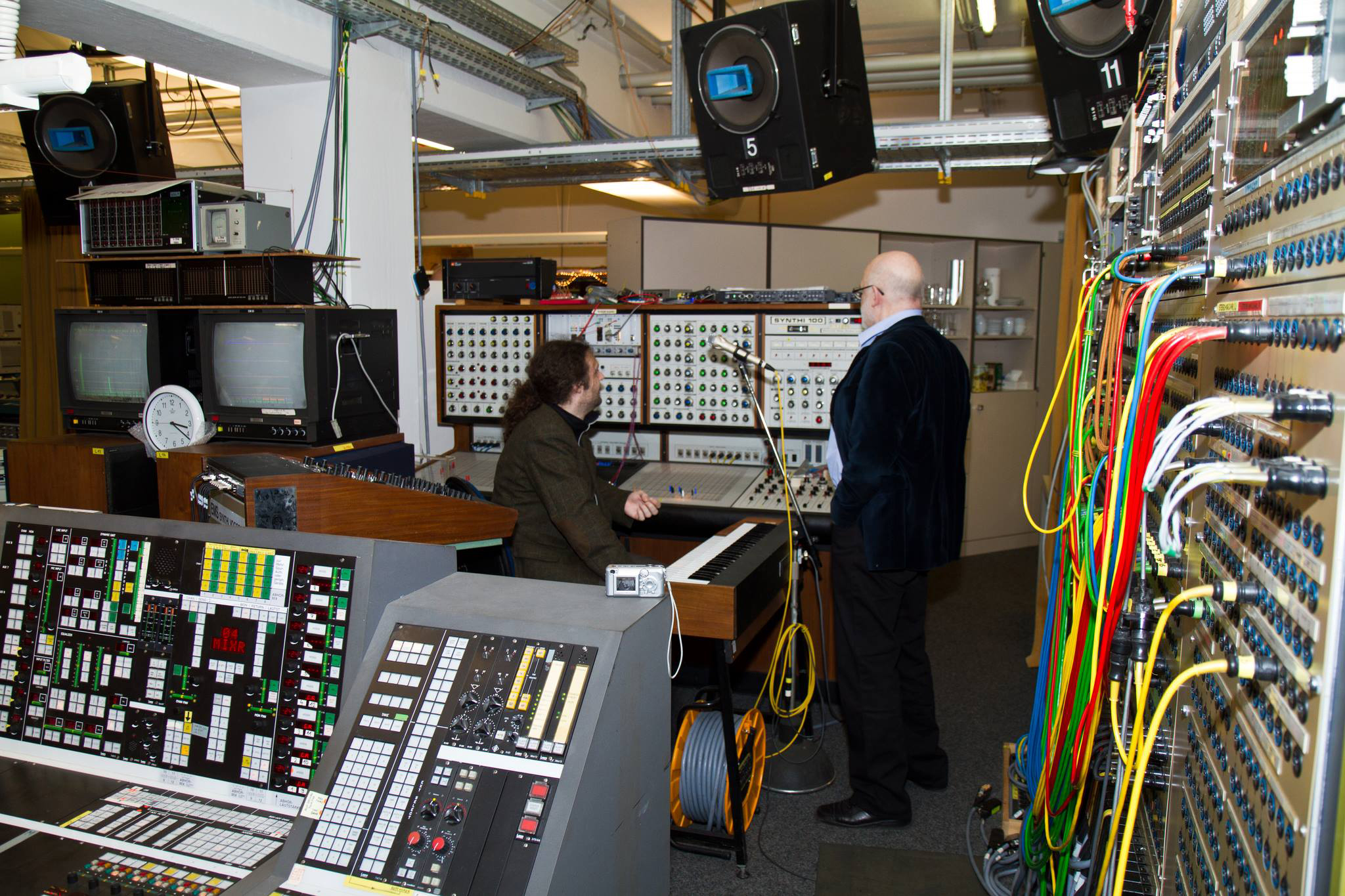 Siegfried Kaercher im Studio fuer elektronische Musik Koeln mit dem Studioleiter von Karl-Heinz Stockhausen